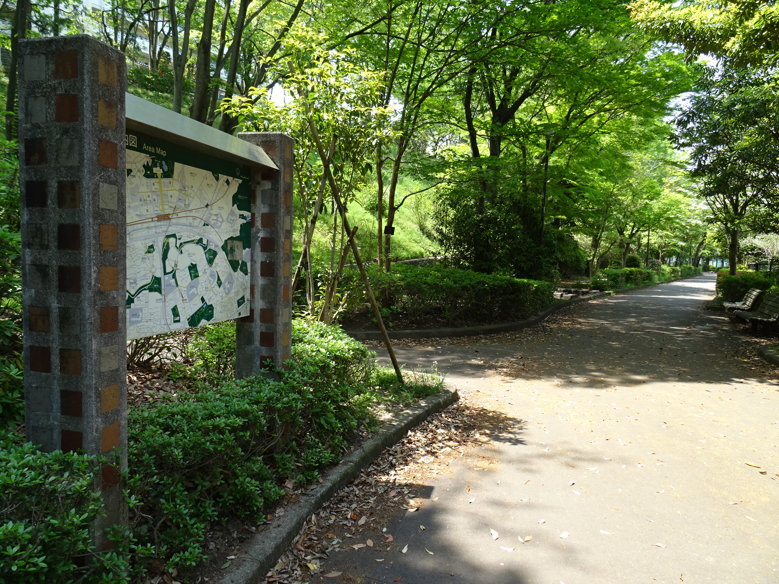 多摩ニュータウンの遊歩道「松が谷散歩道」（2015/04/28撮影）